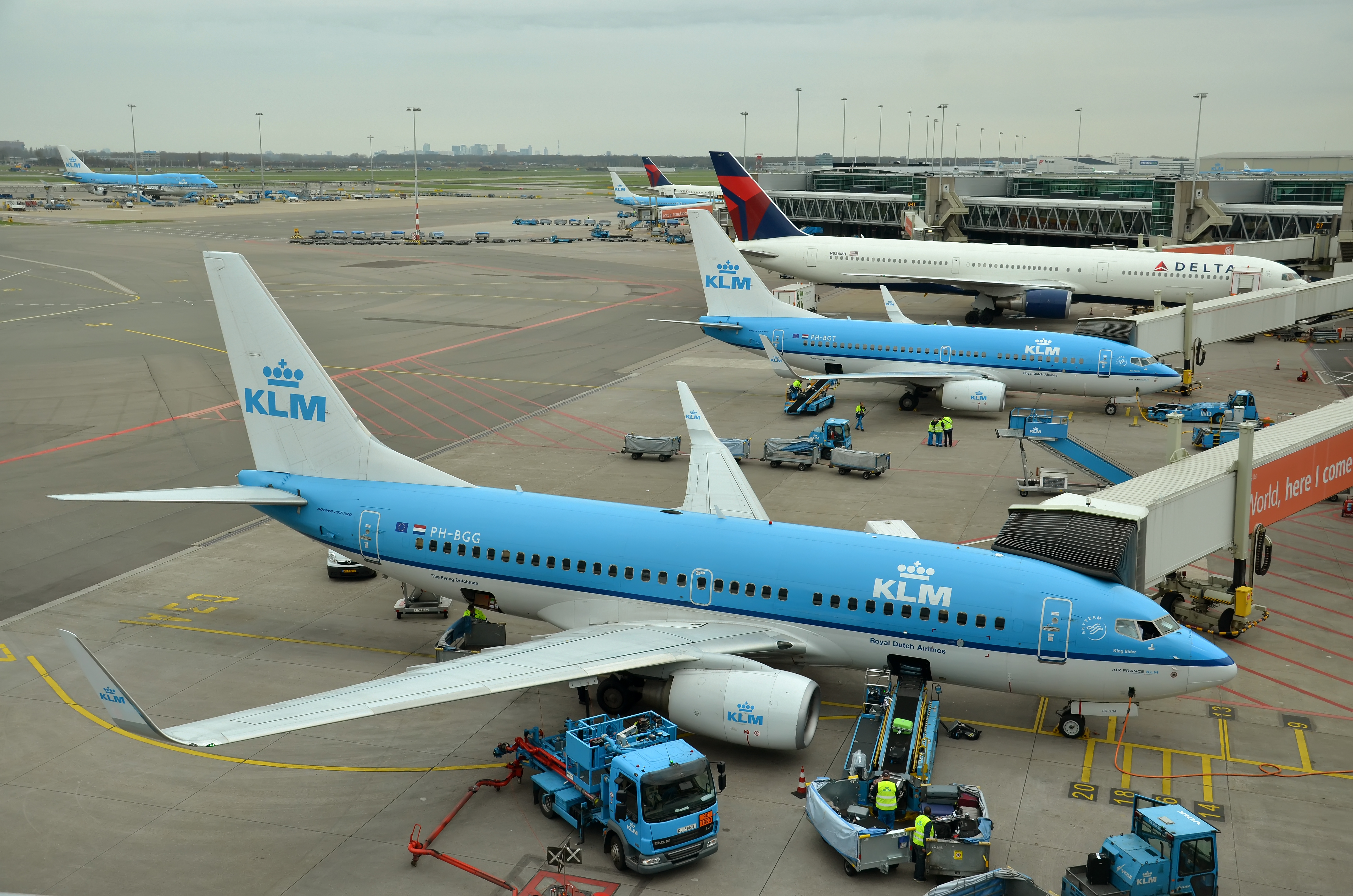 PH-BGG Boeing 737-7K2